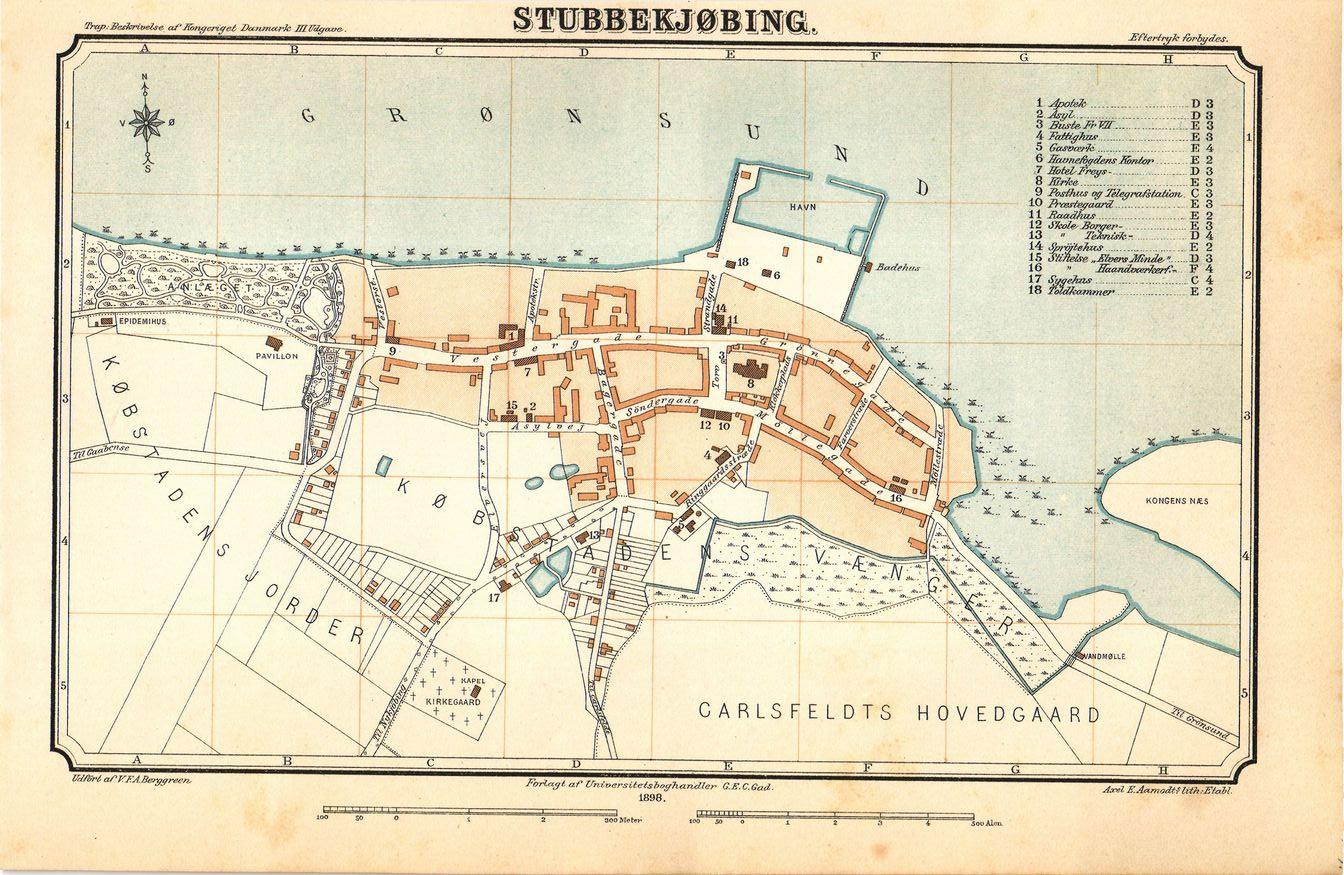 Kort over købstaden Stubbekøbing 1898